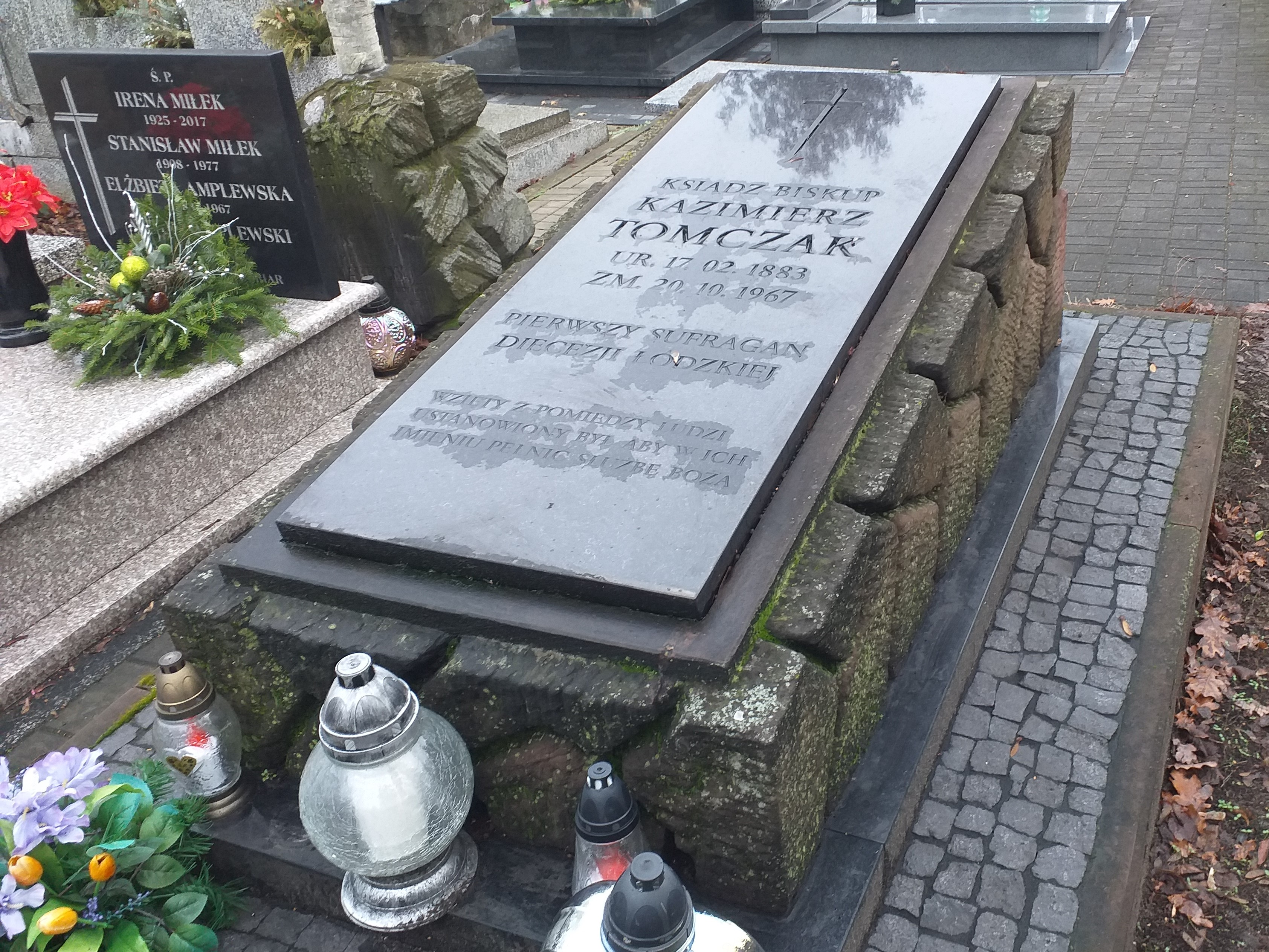 Grób Biskupa Kazimierza Tomczaka